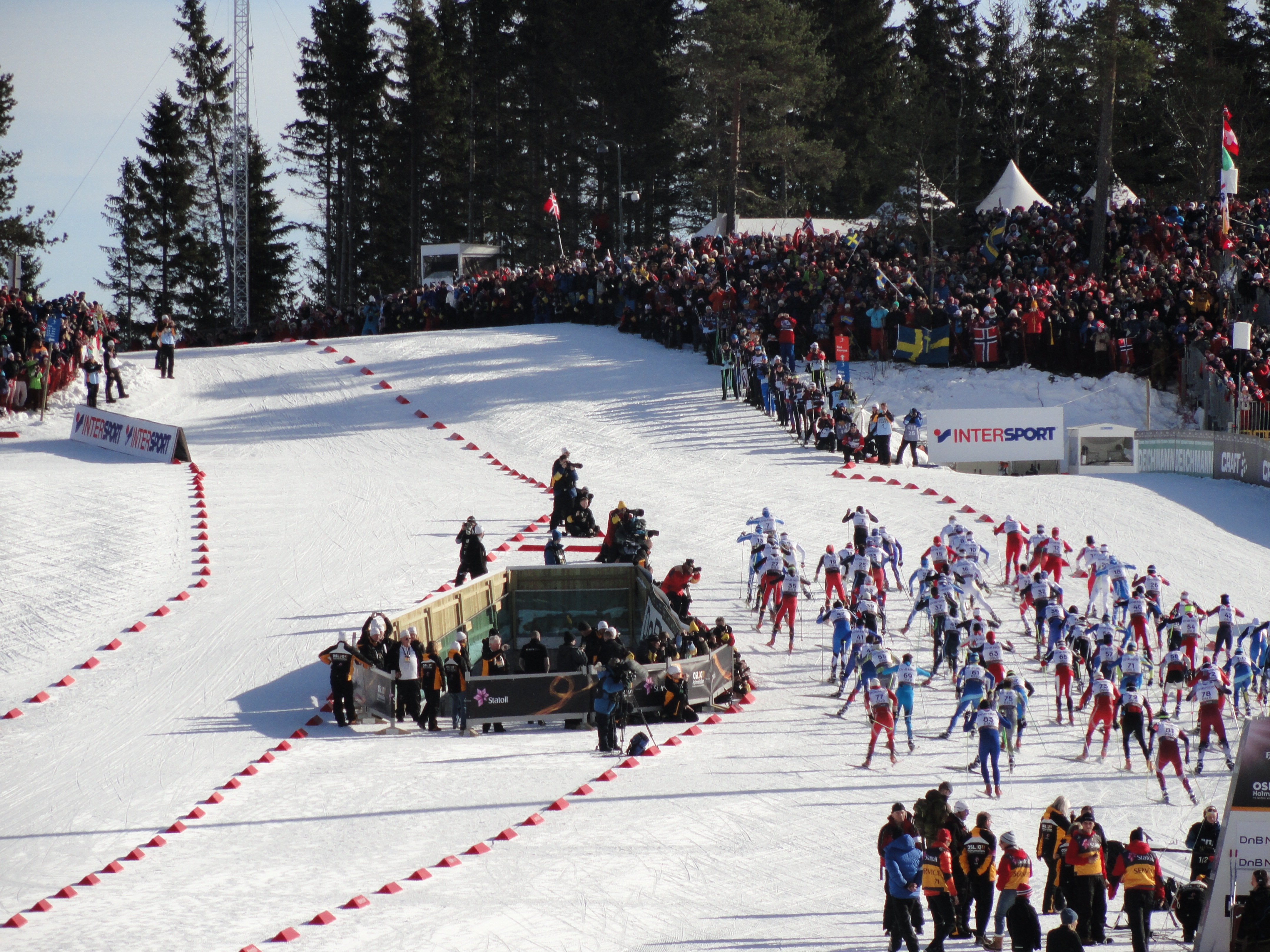 Startfeltet i 50 km fristil herrer